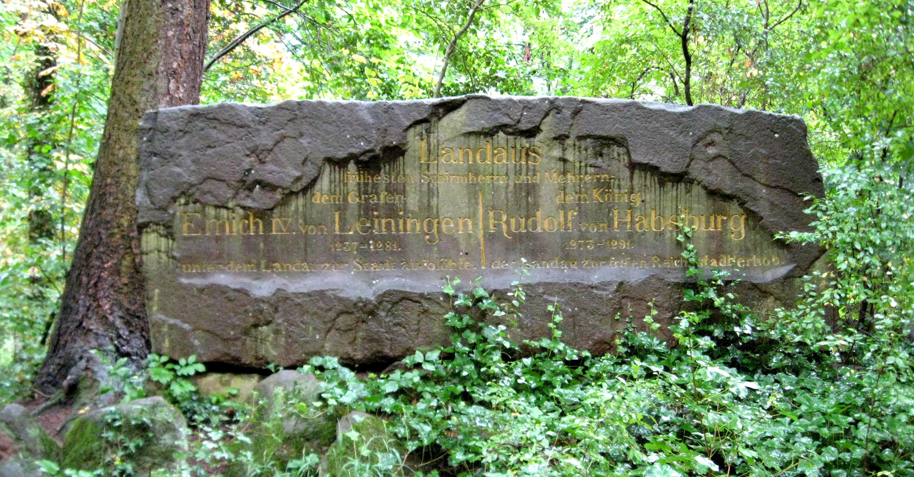 Denkmal in den Fortanlagen von Landau, zur Erinnerung an Emich von Leiningen und Rudolf von Habsburg; Sandsteinblock mit Inschrift, um 1900/10